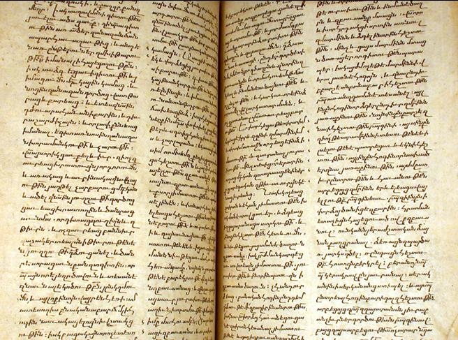 Текст на болоргире